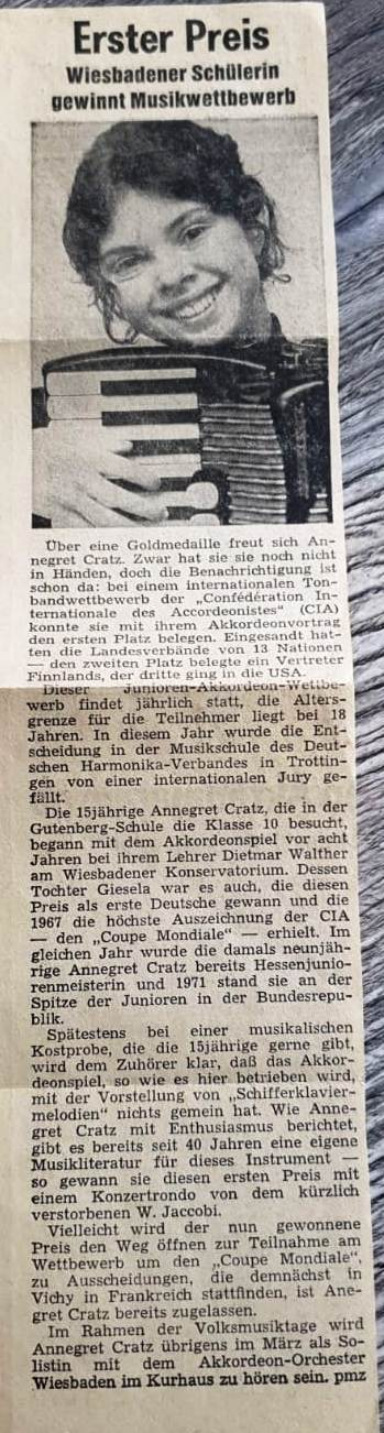 Annegret Cratz hat einen Akkordeon-Wettbewerb gewonnen